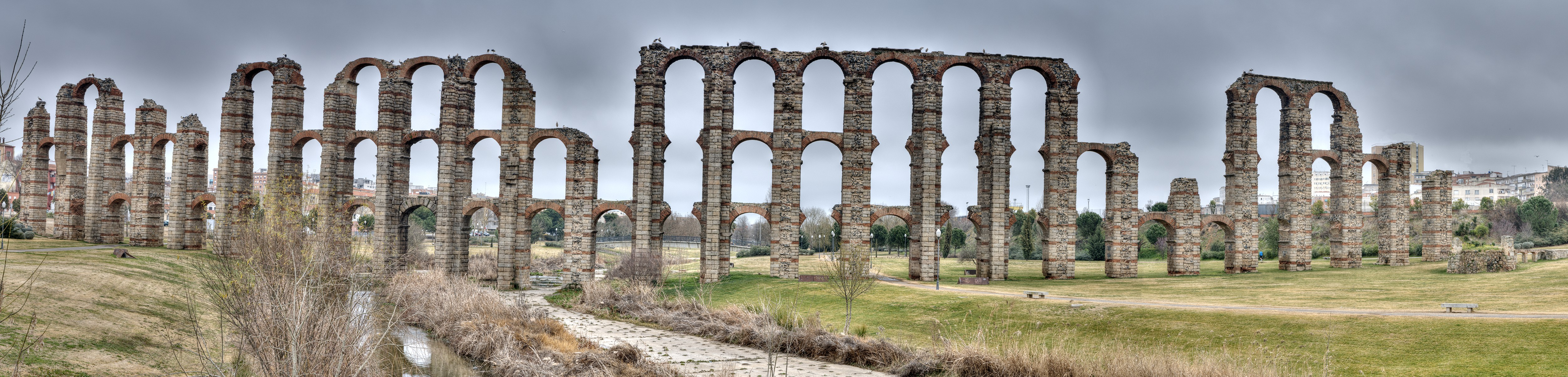 Echaba en falta una panorámica del principal acueducto de Mérida. Hoy amaneció nublado y aproveché la circunstancia para unir 8 fotografías realizadas desde el puente romano sobre el río Albarregas. La panorámica original tiene 17800 x 4300 píxeles. BIC RI-51-0000112.